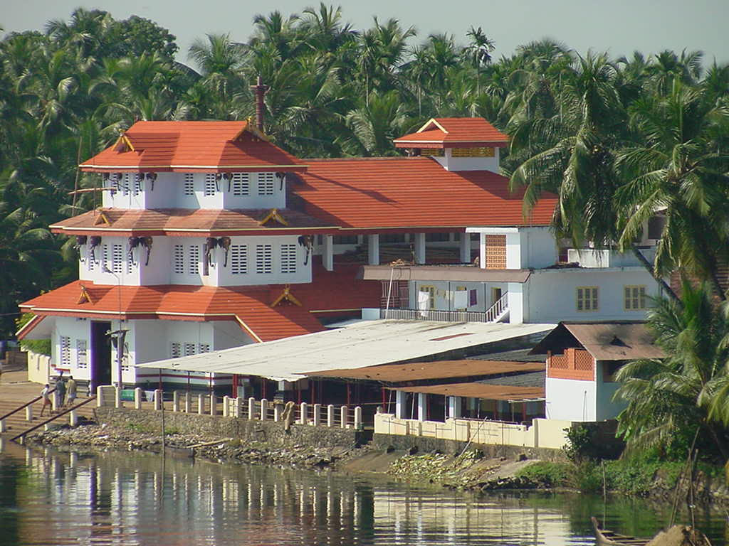 Parassini Madappura Sree Muthappan Temple